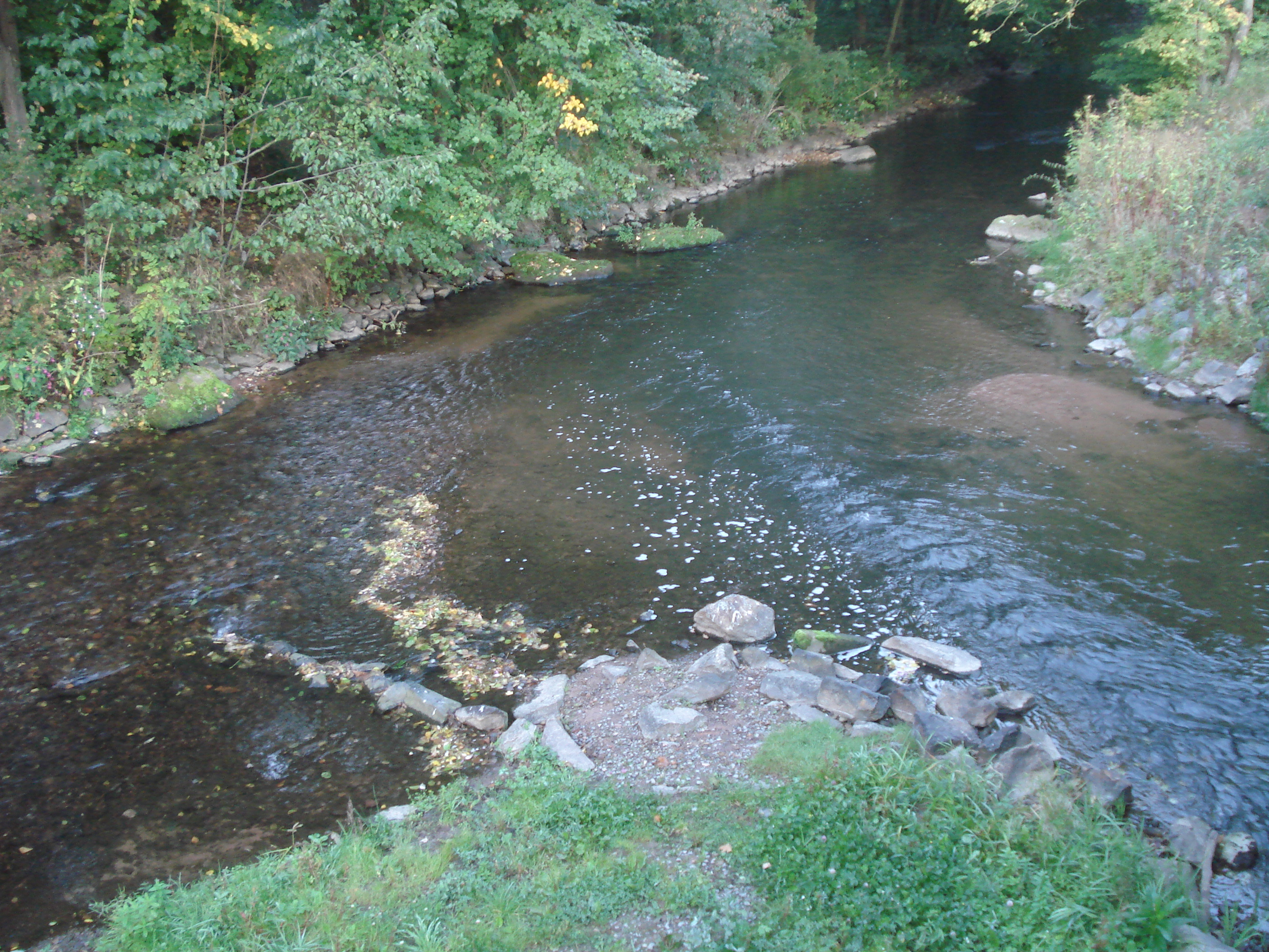 Der Billbach (vorne rechts) mündet in die Mud (von vorne links nach hinten rechts)